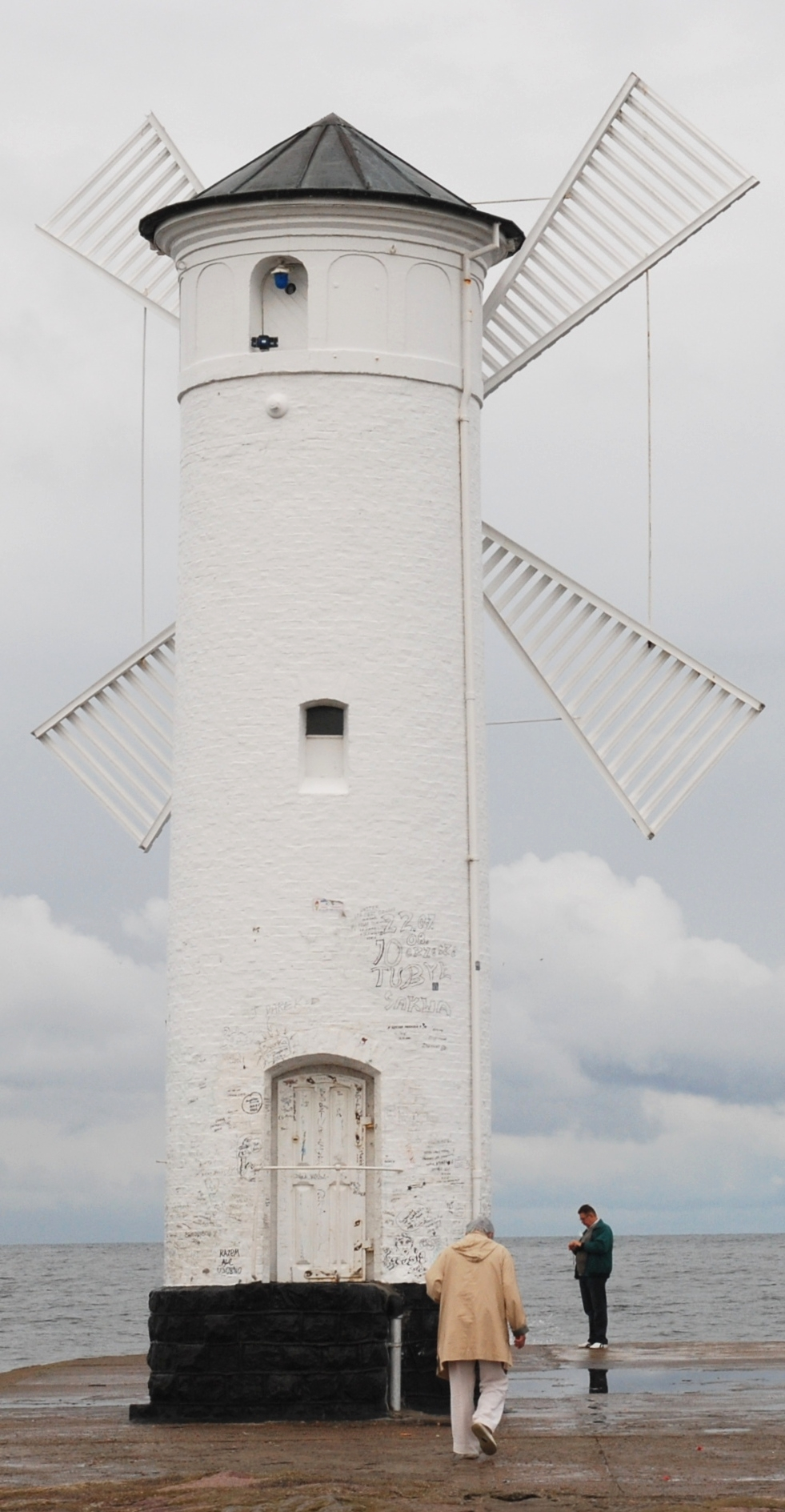 Stawa Młyny, Świnoujście